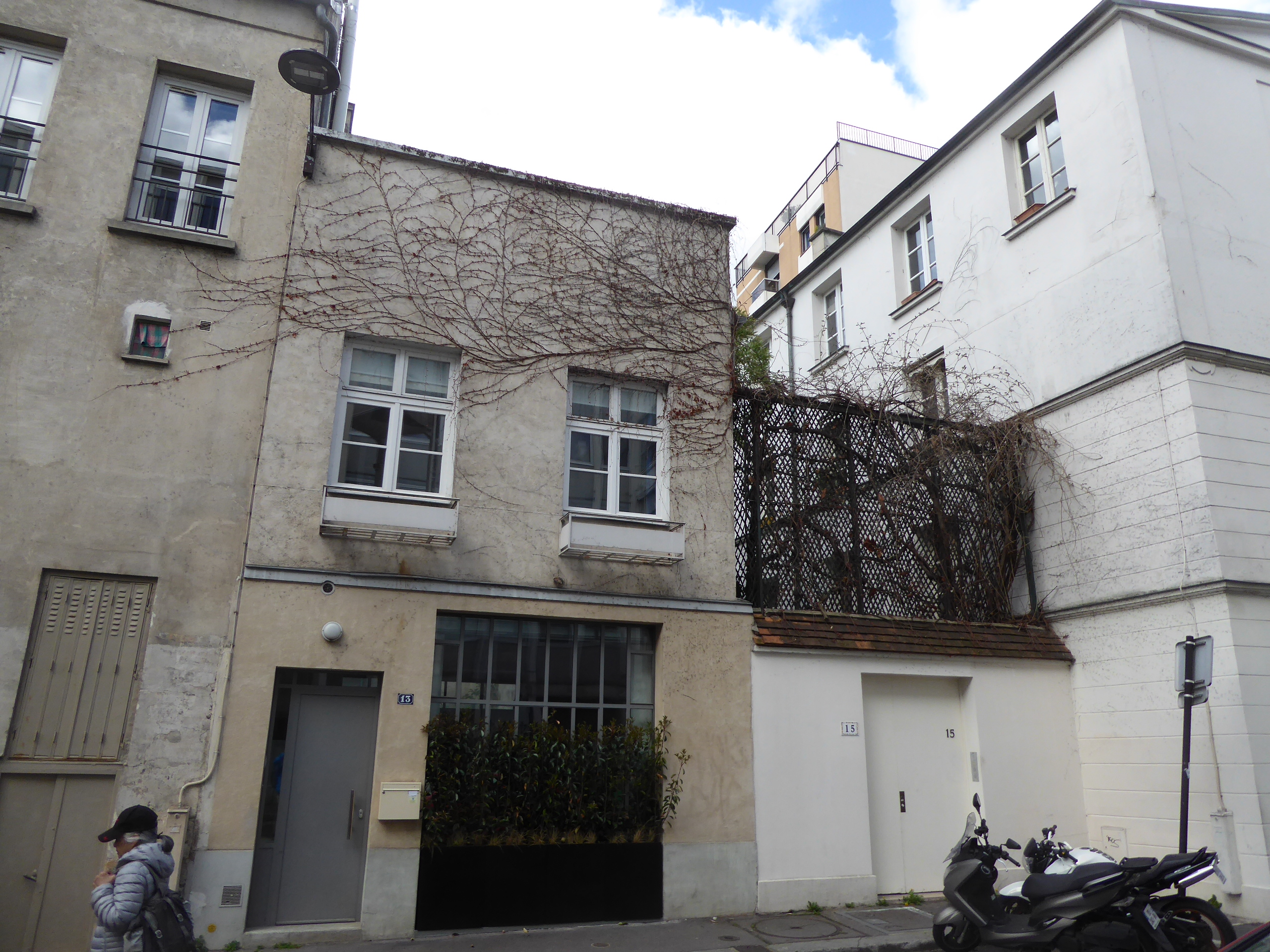 13 rue de la Clef ancien passage de la Bièvre